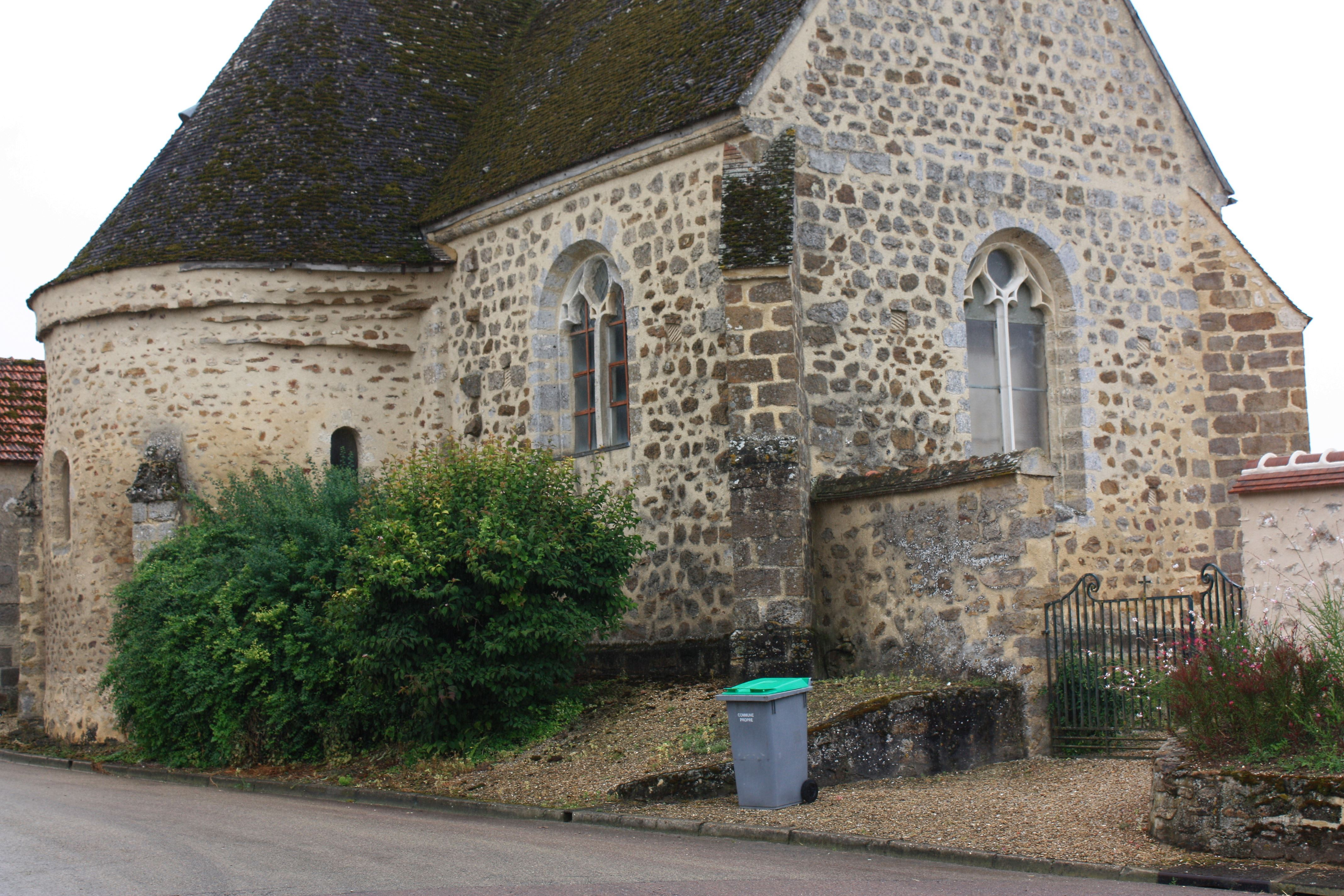 Fontenay-de-Bossery - Eglise Saint-Jean-Baptiste Vue du Nord-Est